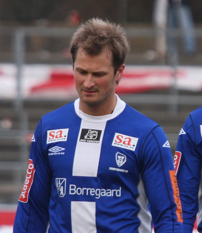 Alexander_Forsberg, Sarpsborg 08